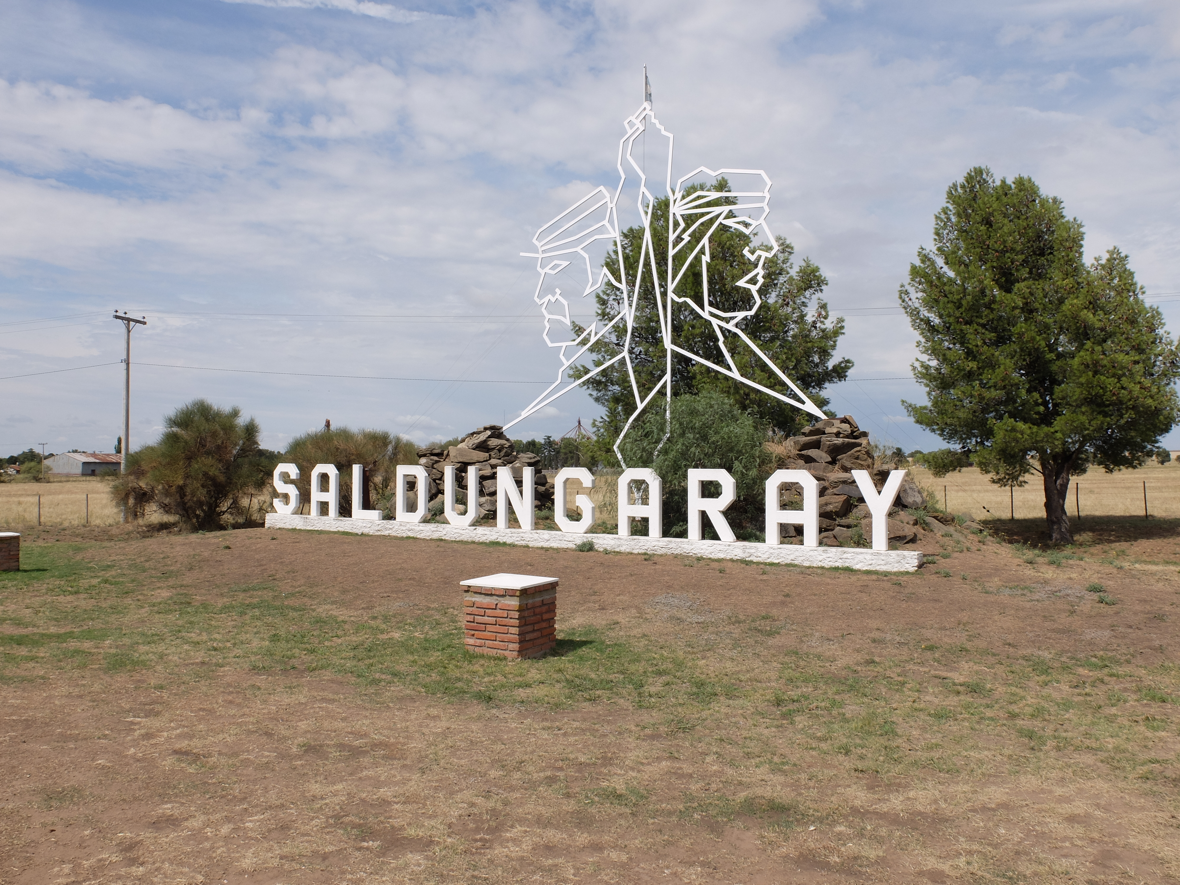 Monumento en la entrada a Saldungaray